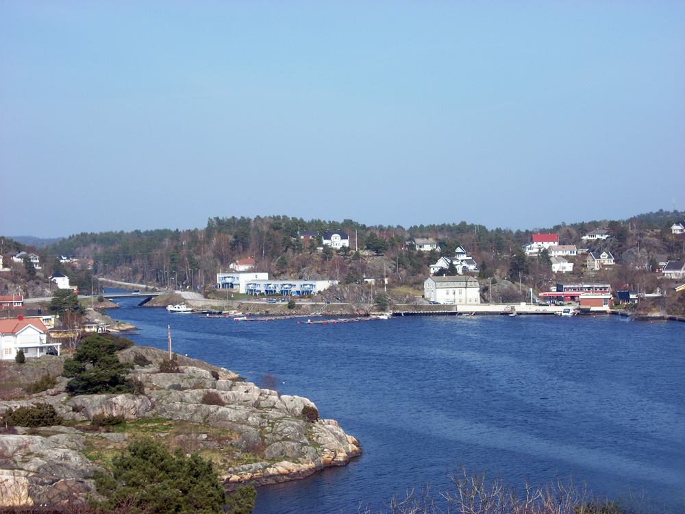 Indre del av Neskilen på Eydehavn, med Neskilbroa og det gamle kommunehuset som er ombygd til leiligheter. Eydehavn Service og Marina til høyre i bildet.